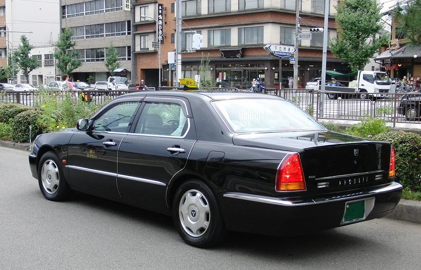 三菱・プラウディア。